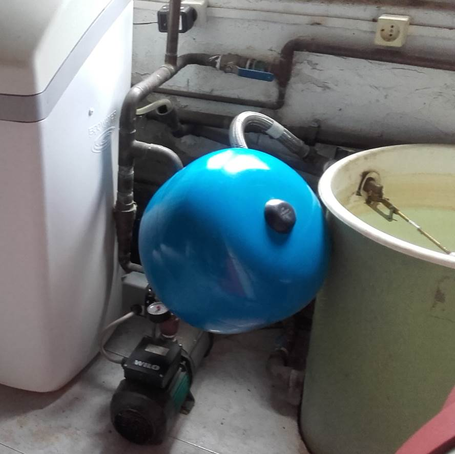 Grupo de presión doméstico con aljibe, bomba horizontal e hidrosfera